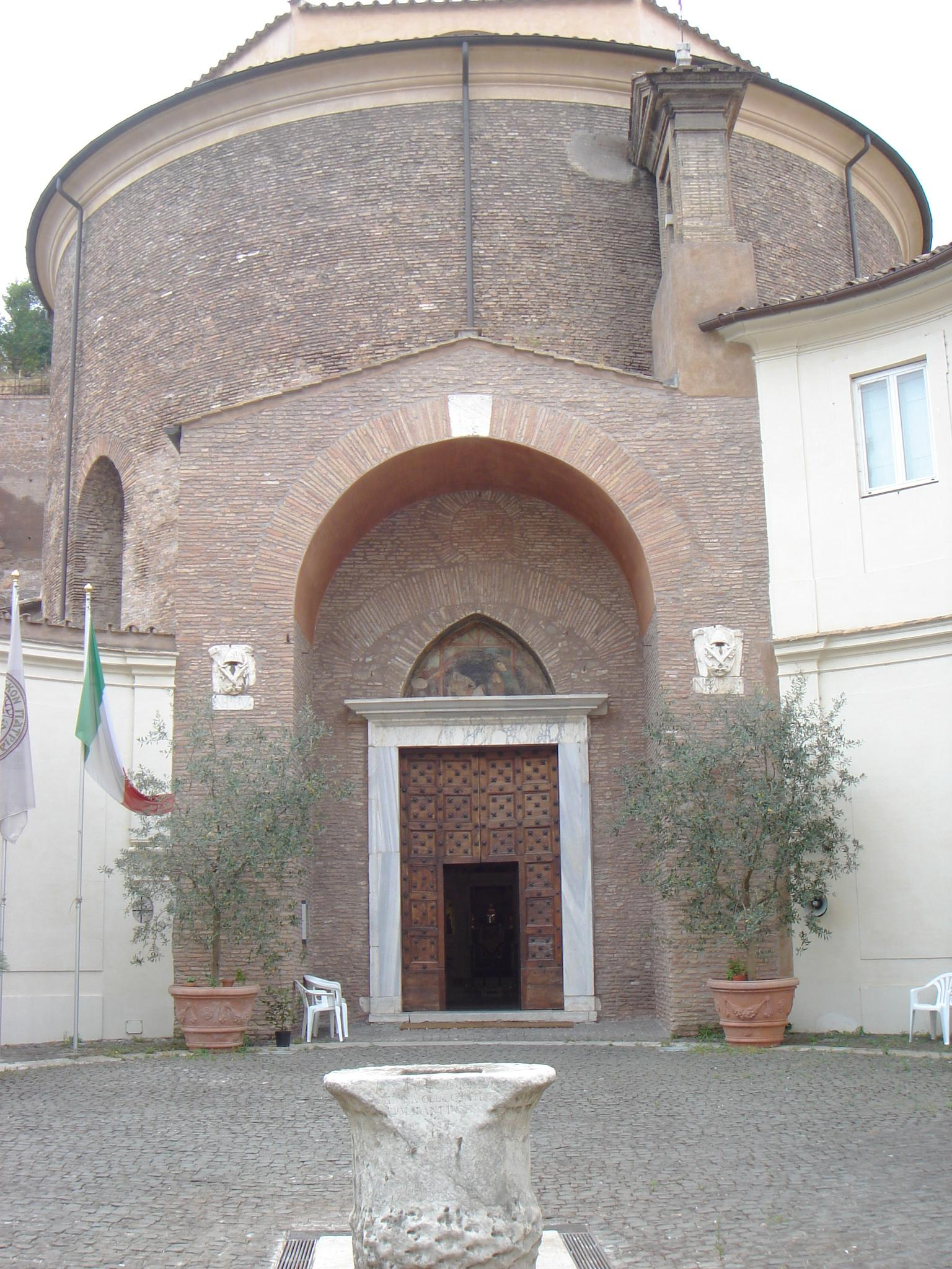 Roma, san Teodoro al Palatino